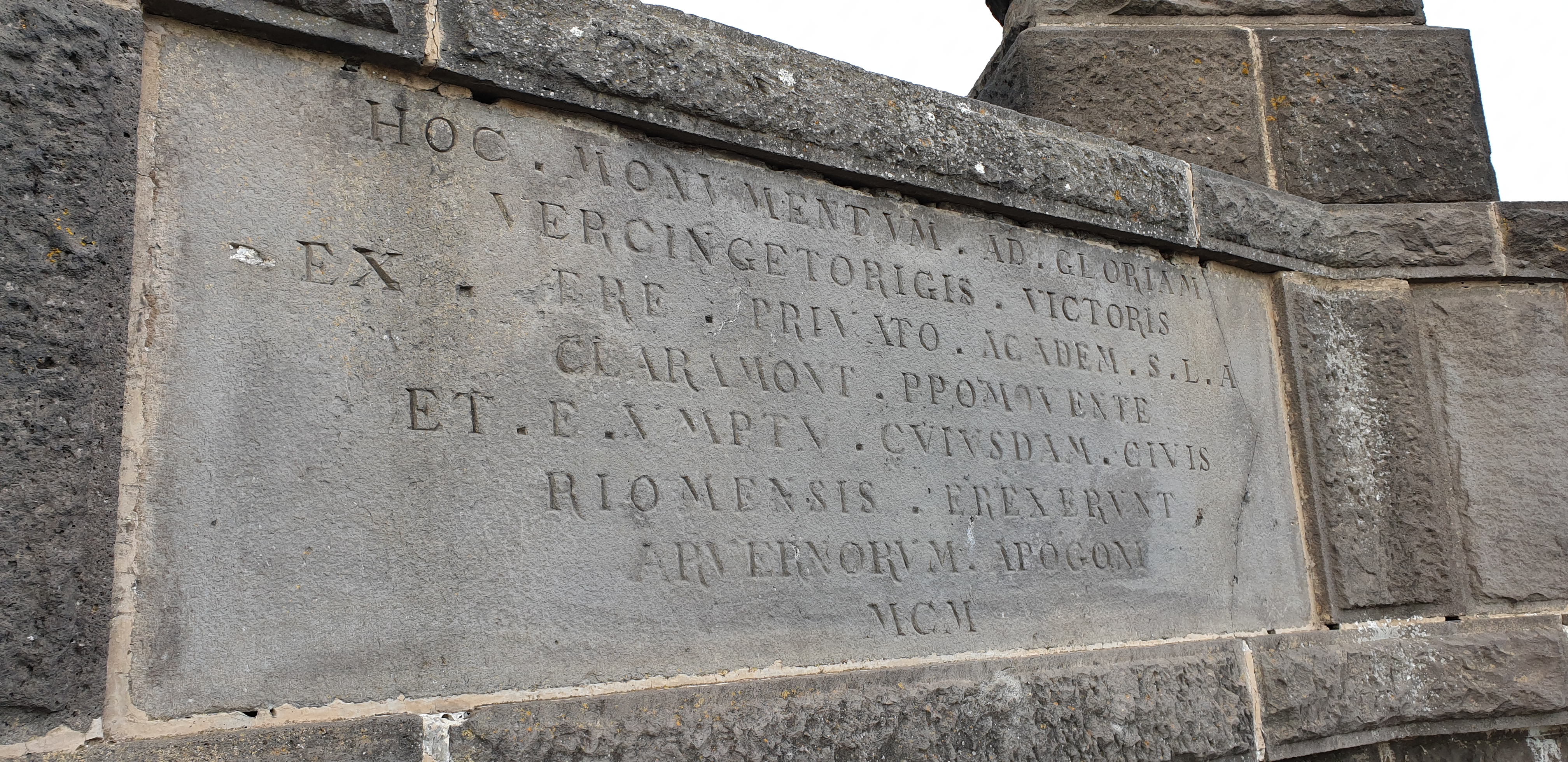 Inscription latine